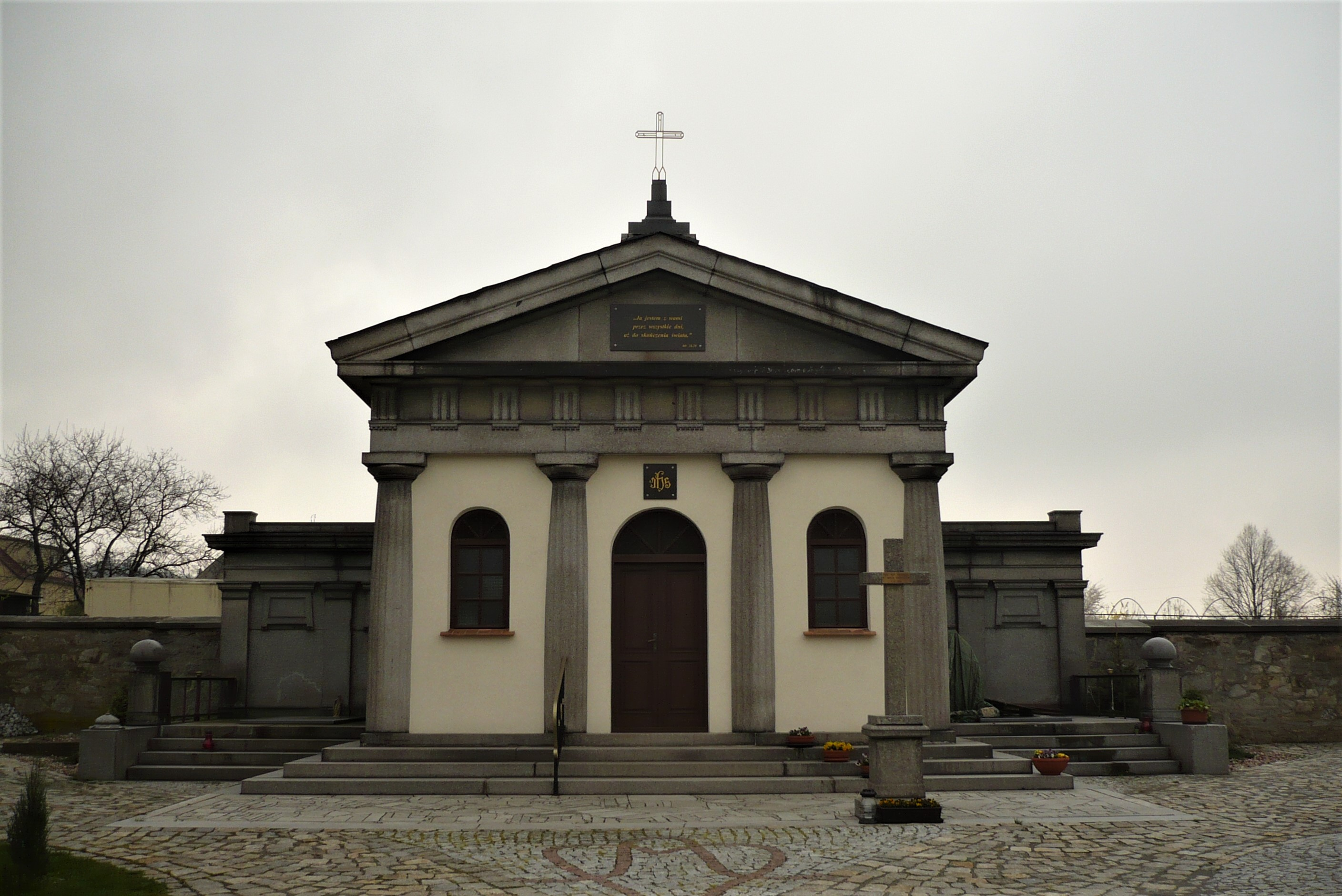 Kaplica w Mrowinach